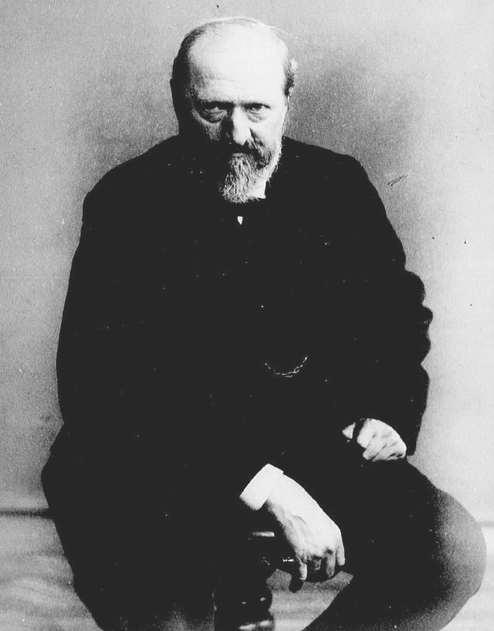 Biographies alsaciennes avec portraits en photographie. Série 3.